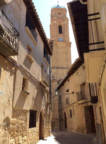 Iglesia de Belmonte de San José - Teruel